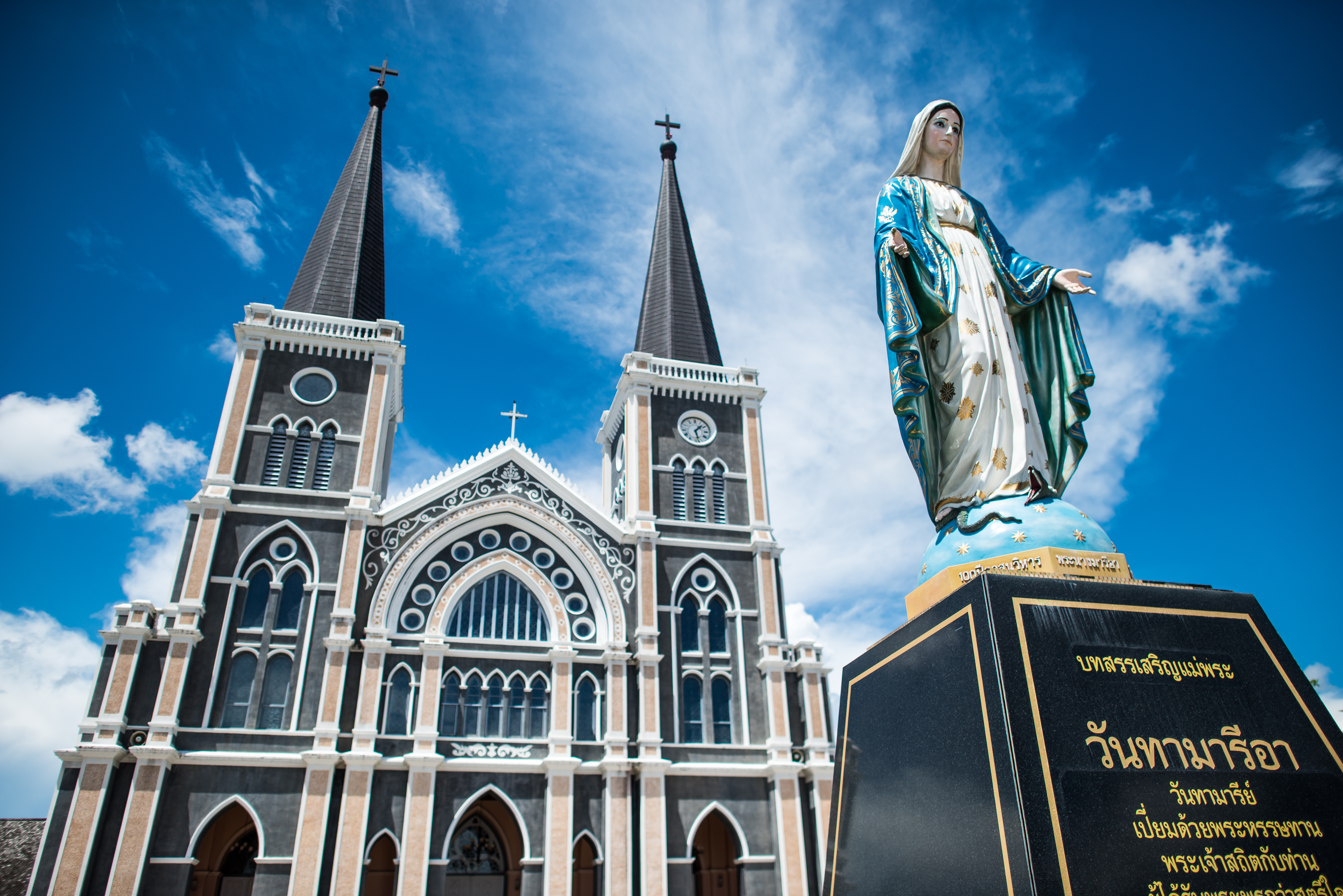 วัดโรมันคาทอลิก